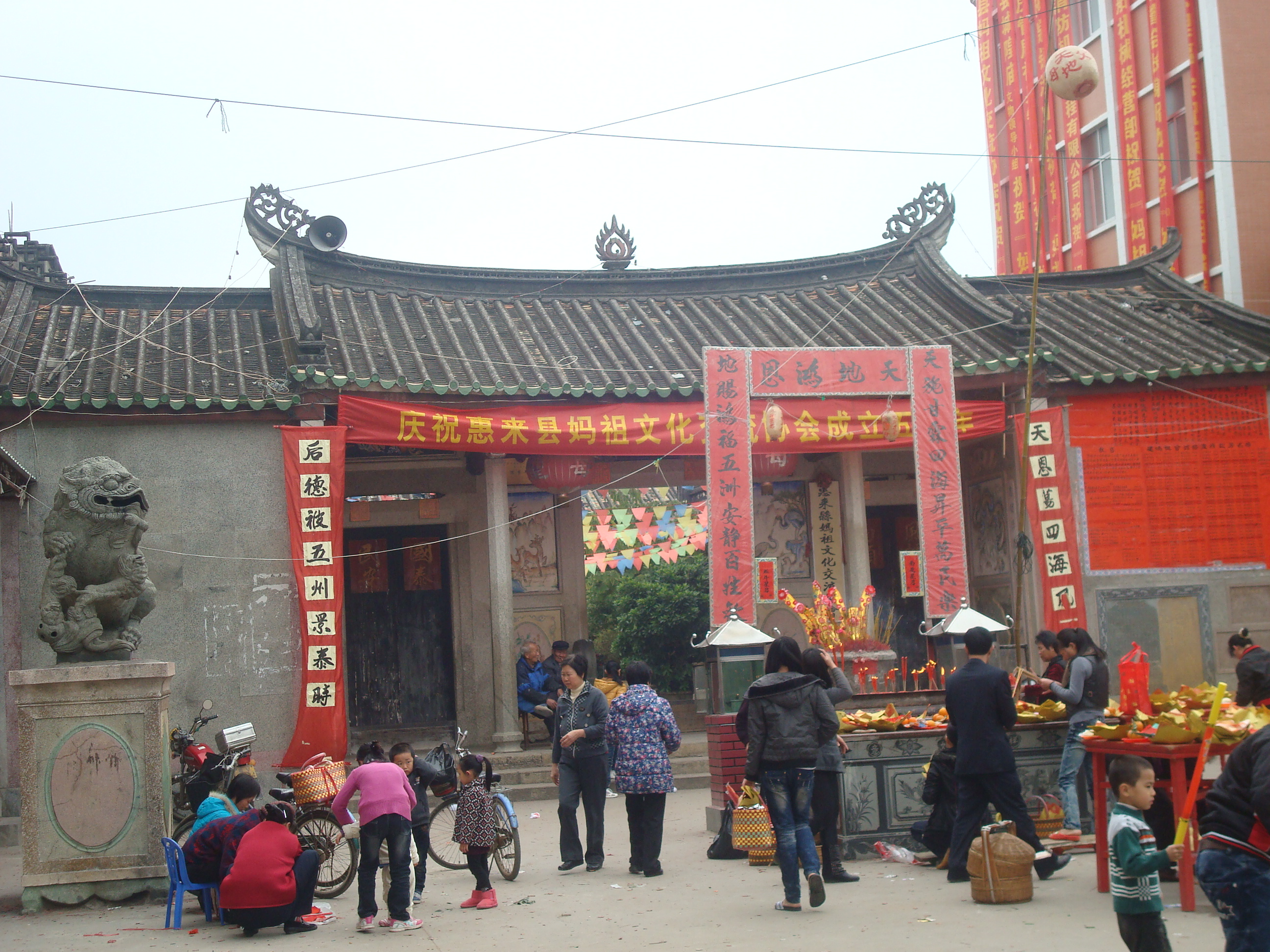 神泉鎮天后宮。